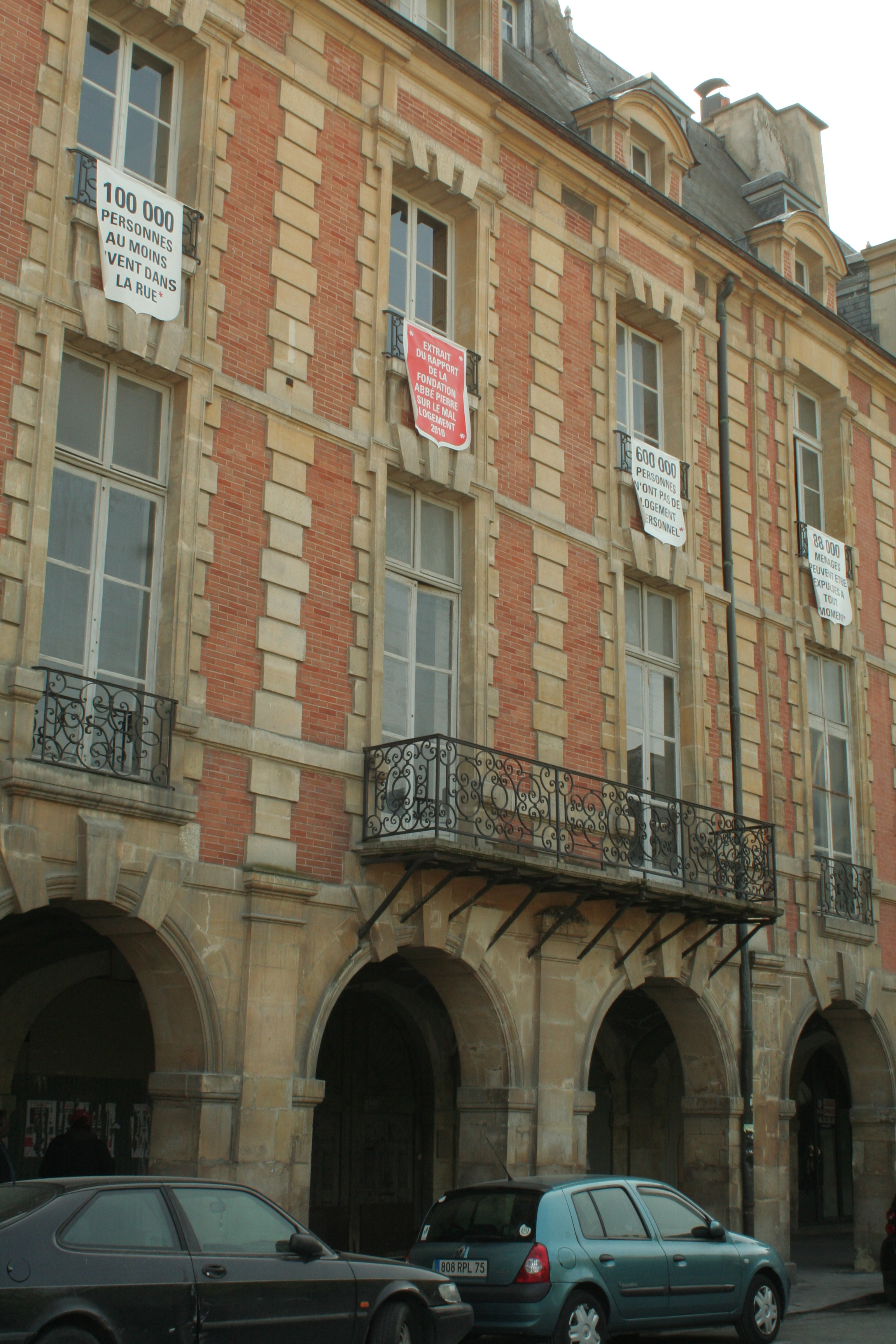 Hôtel Coulanges, 1bis place des Vosges, Paris, réquisitionné par le Collectif jeudi noir (banderoles)